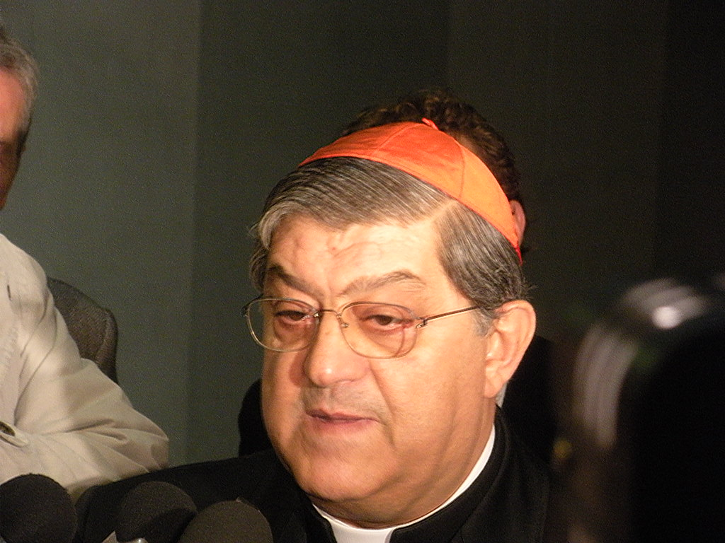 Cardinale Arcivescovo di Napoli Crescenzio Sepe